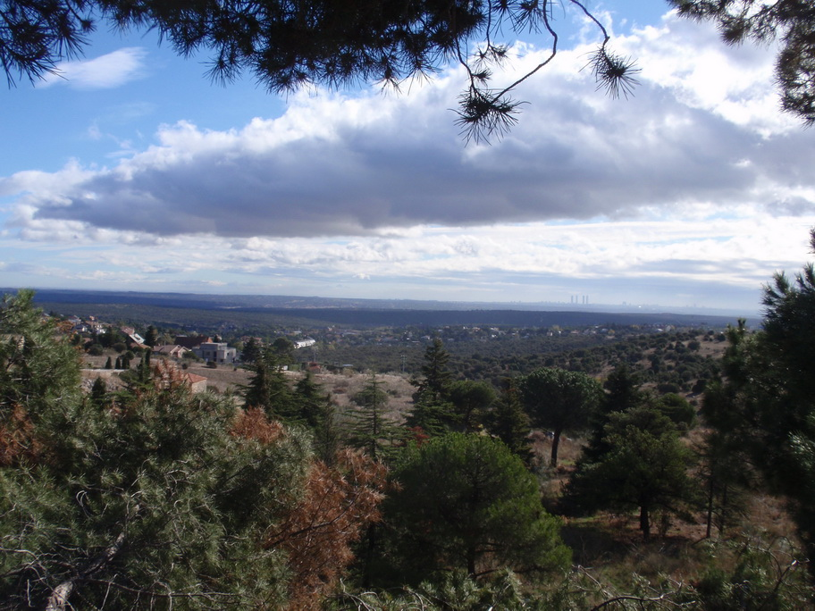 Torrelodones. Área Homogénea Norte. Al fondo, las 4 Torres de Madrid.